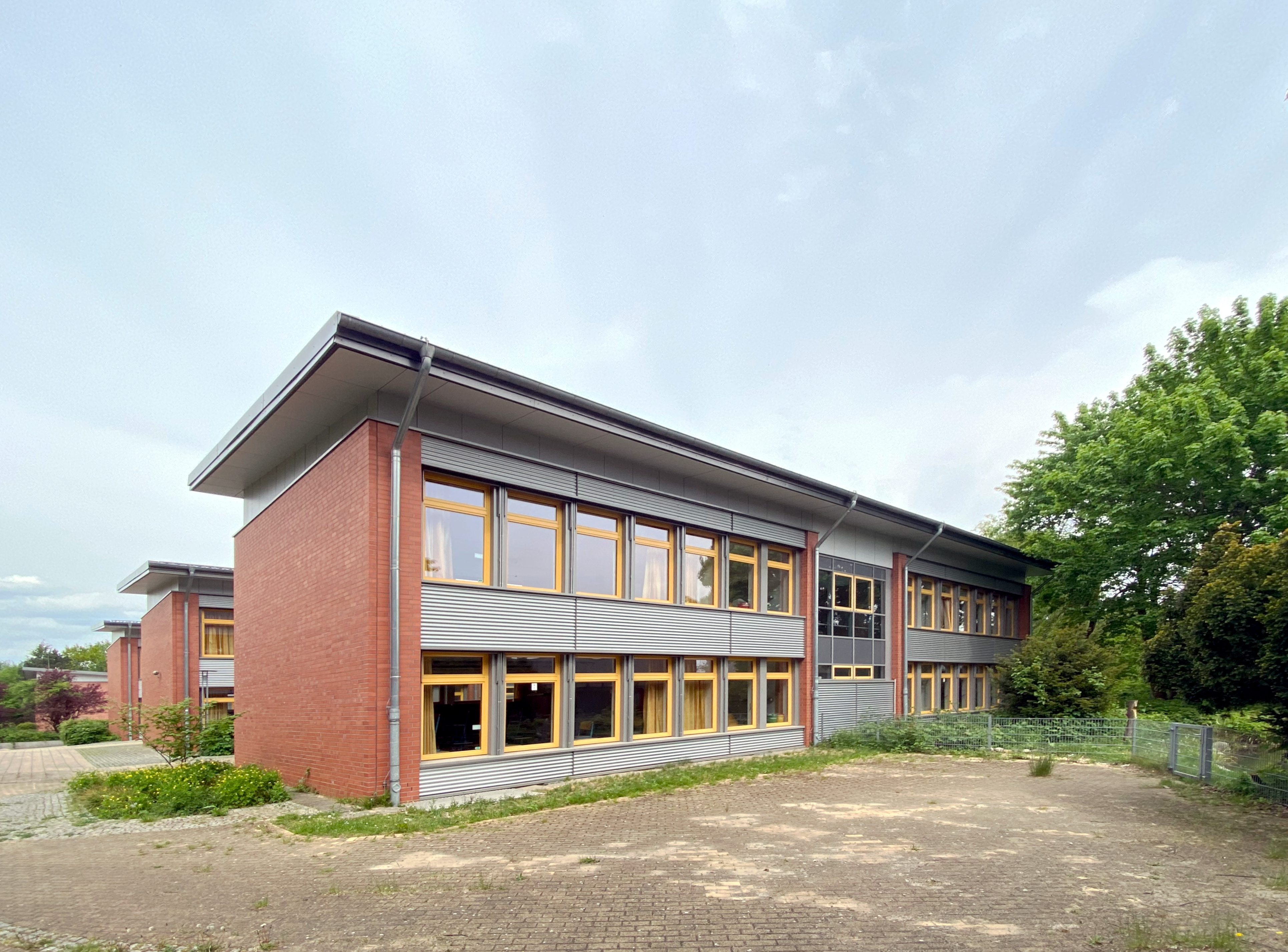 Gymnasium Meiendorf in Hamburg-Rahlstedt, Klassenhäuser